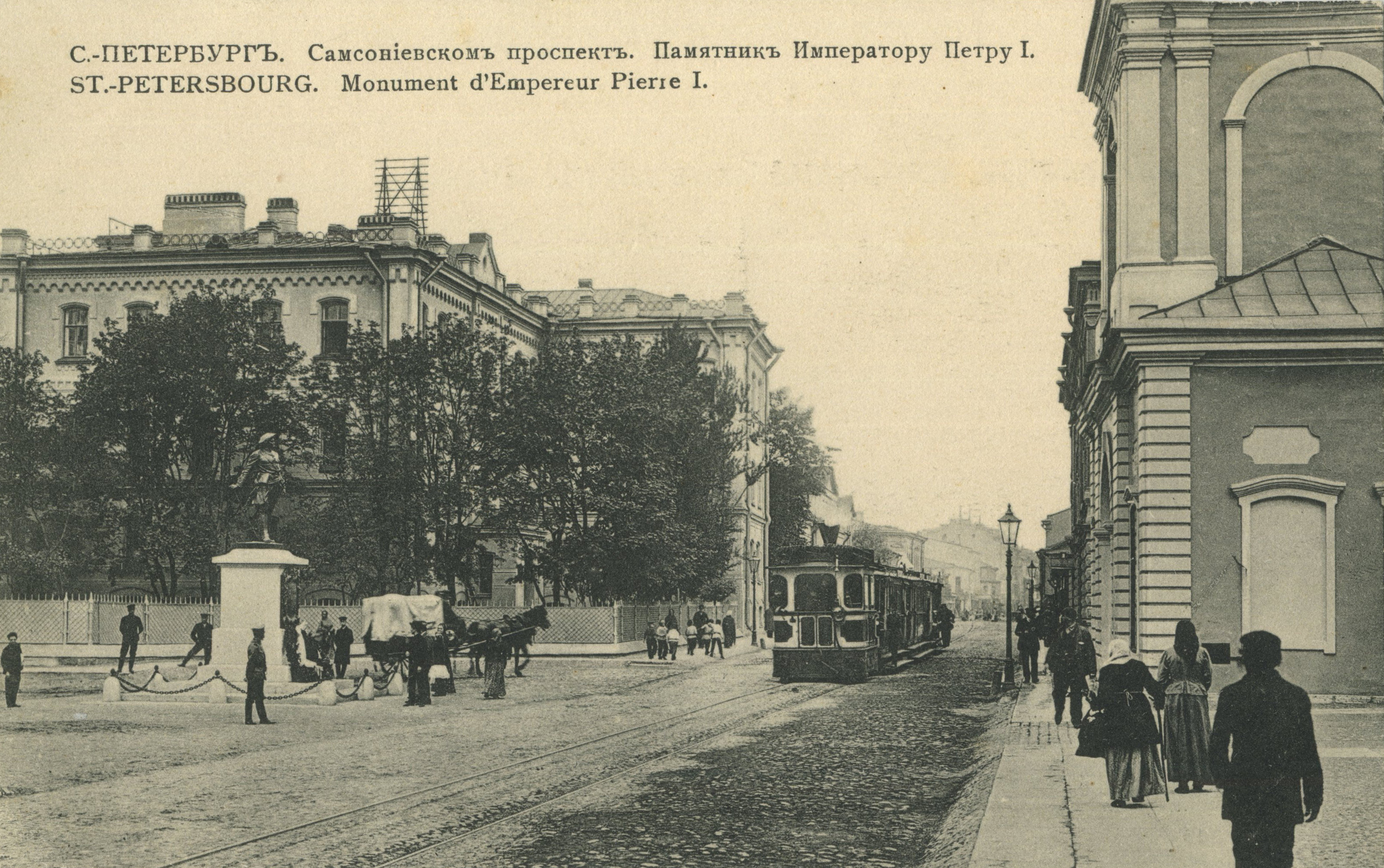 Санкт-Петербург. Открытка начала XX века.